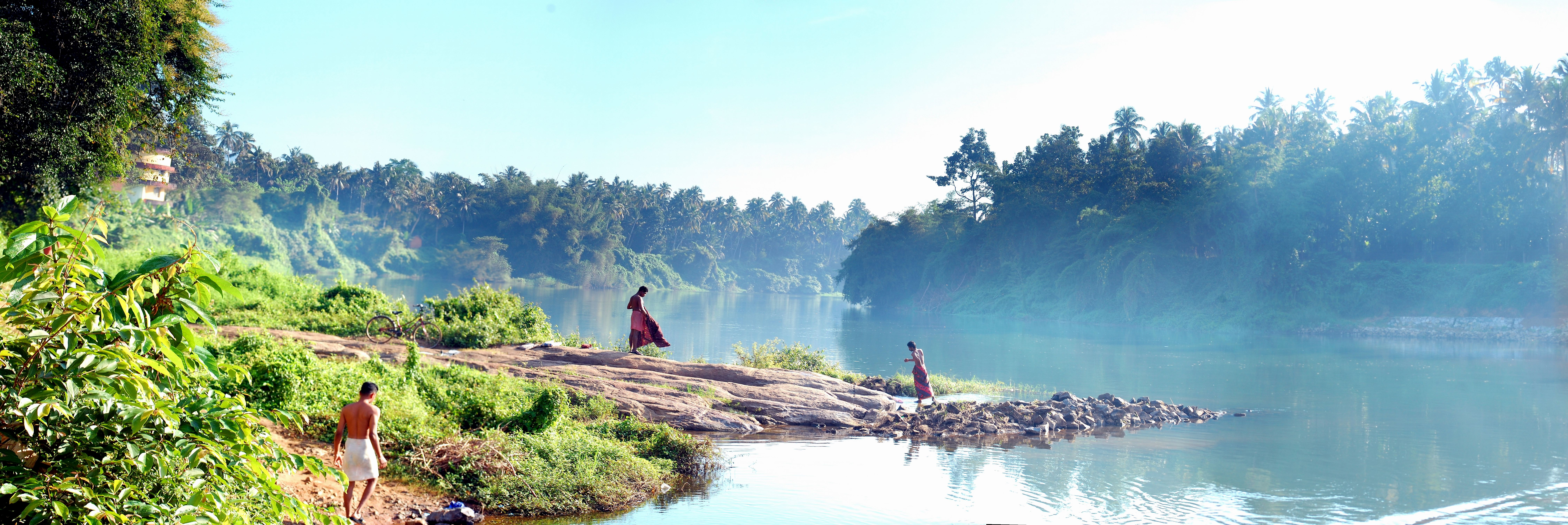 കൂടപ്പുഴ കടവ്